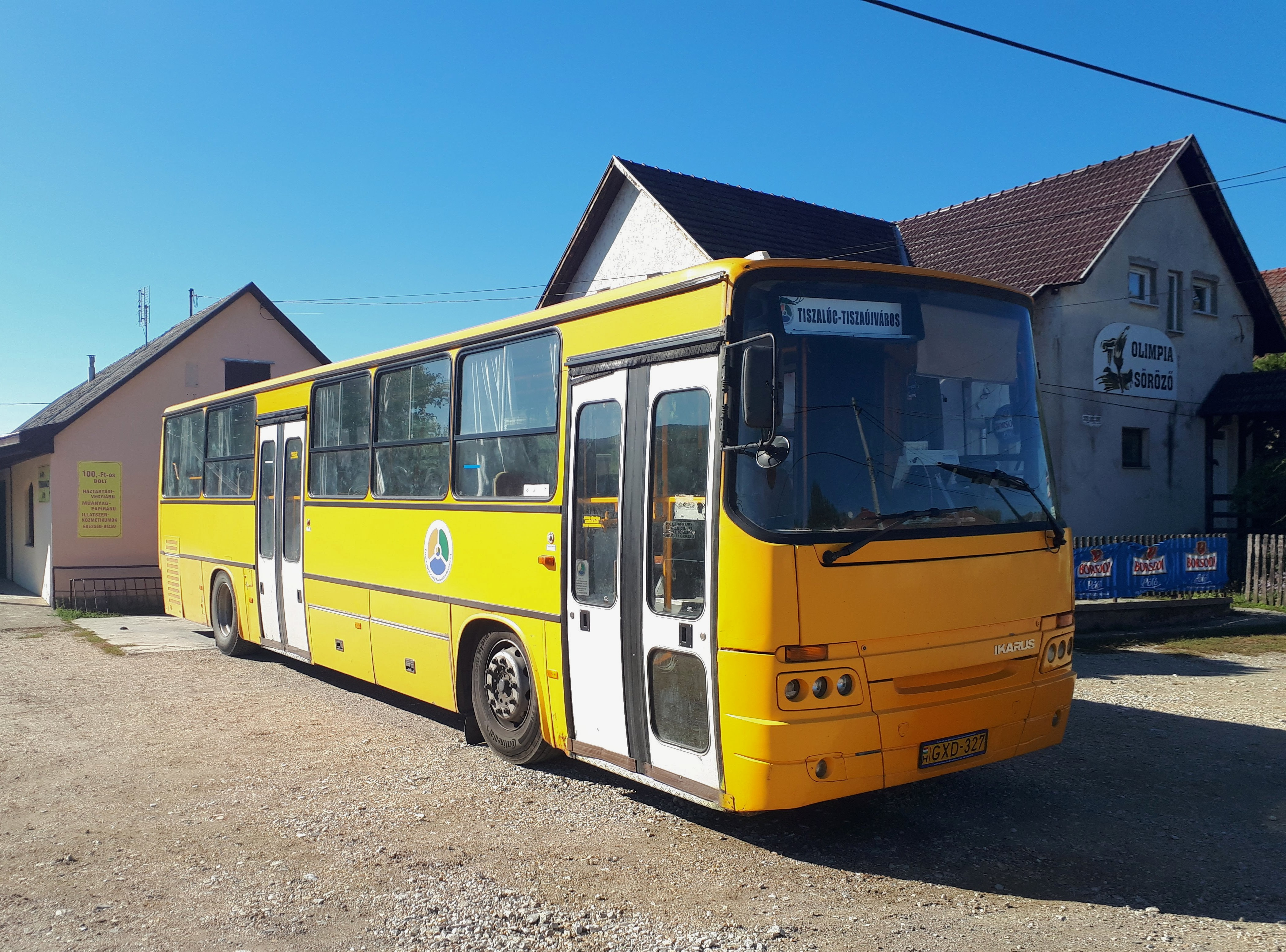 Az ÉMKK GXD-327 rendszámú Ikarus C56 típusú busza Bőcsött, a 3992-es helyközi járaton.